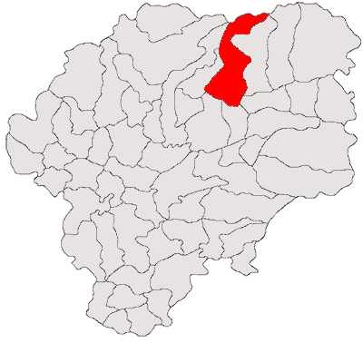 Categorie:Hărţi ale judeţului Bistriţa-Năsăud